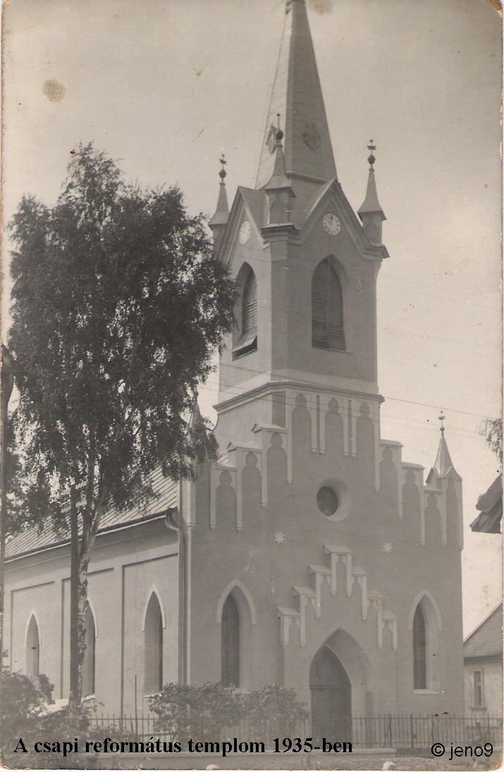 Csapi reformatus templom 1935-ben